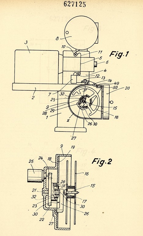 Eugen Bauer G.m.b.H., brevetto di un proiettore cinematografico, Stoccarda 1961, Disegno per il brevetto per invenzione industriale n. 627125, classe G 03 b., della società Eugen Bauer G.m.b.H. per un proiettore cinematografico dotato di apposito motore per l'avvolgimento della pellicola, Stoccarda. Domanda di brevetto n. B 56336. Data di deposito: 16 aprile 1960. Data di concessione: 25 ottobre 1961 (AS Genova, Ufficio provinciale industria, commercio e artigianato di Genova, Fondo Brevetti), Stoccarda, Germania, Estero. Archivio di Stato di Genova Istituto Centrale per gli Archivi LocationRoma, ItaliaCoordinates41° 54′ 24.5″ N, 12° 30′ 29.2″ E Established1998Web page control : Q3803705 institution QS:P195,Q3803705